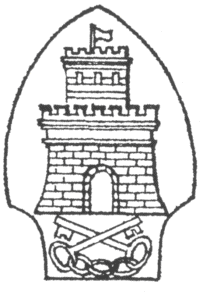 stemma Serre